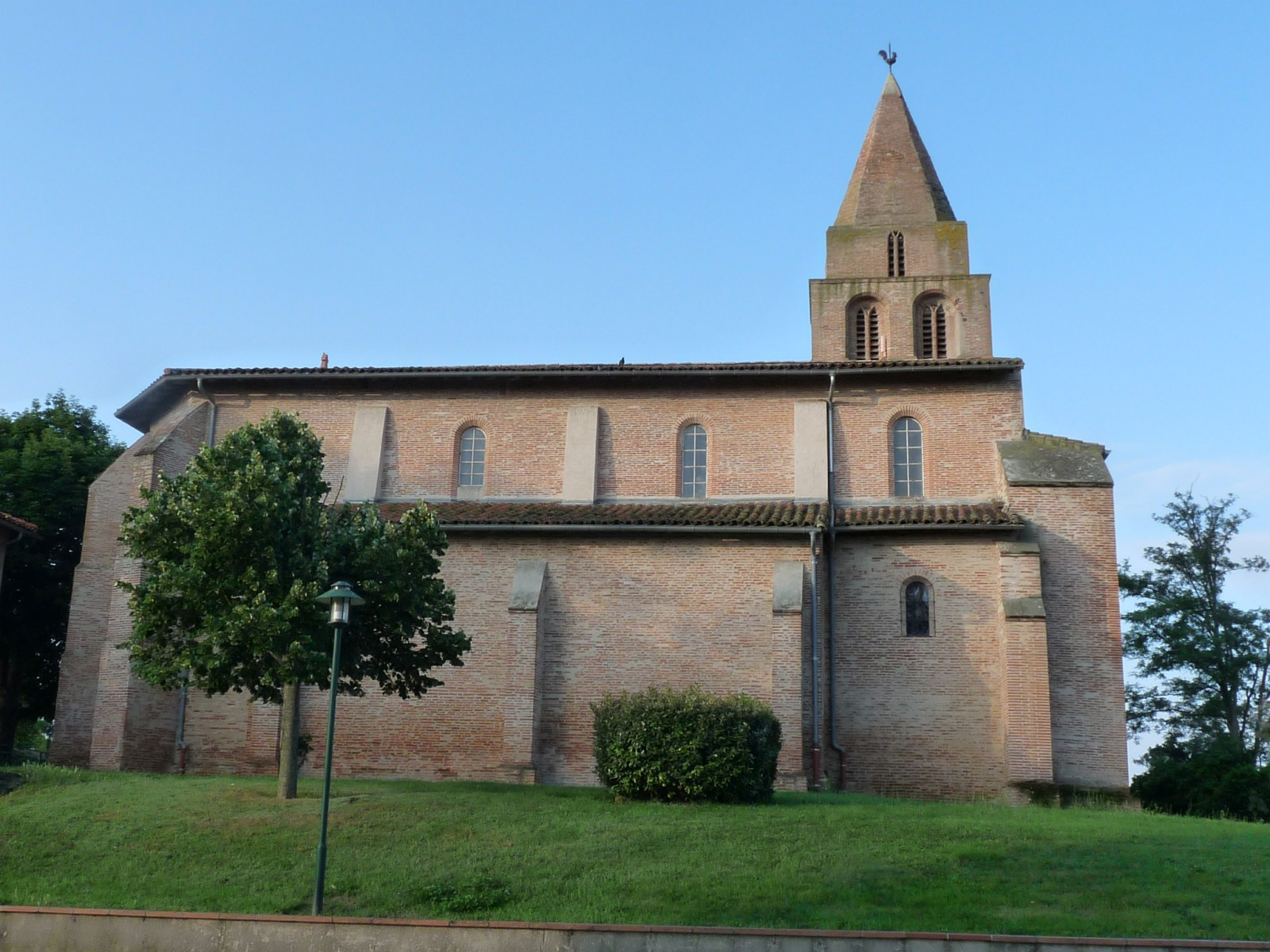 Eglise d'Auzielle, Haute-Garonne, France